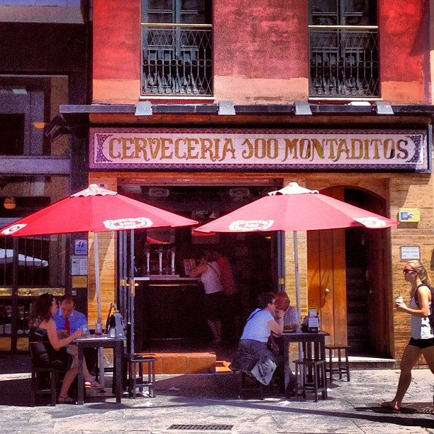 Un establecimiento de la cadena "100 montaditos", en Sevilla.